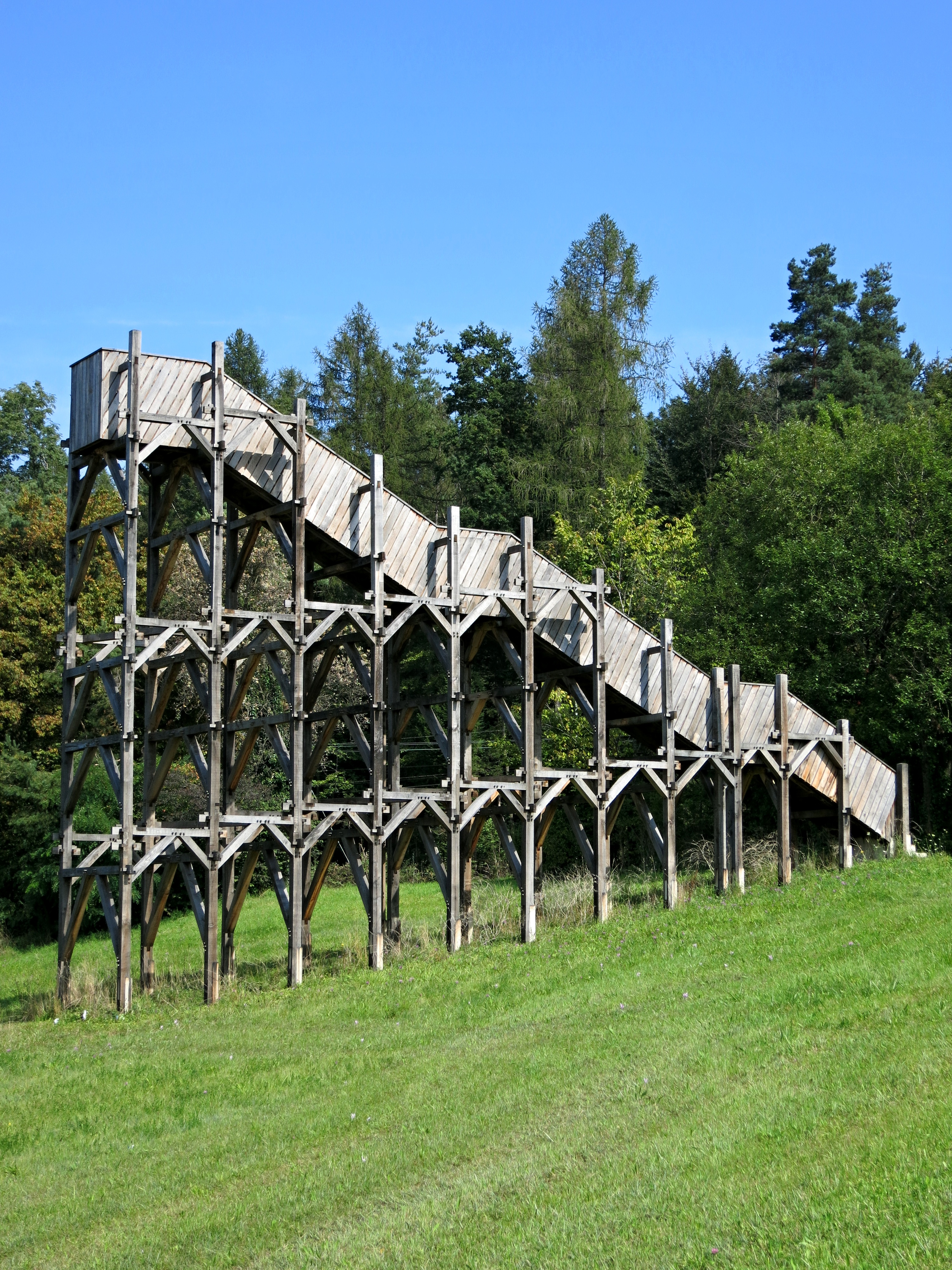 Belvedere Zollikon